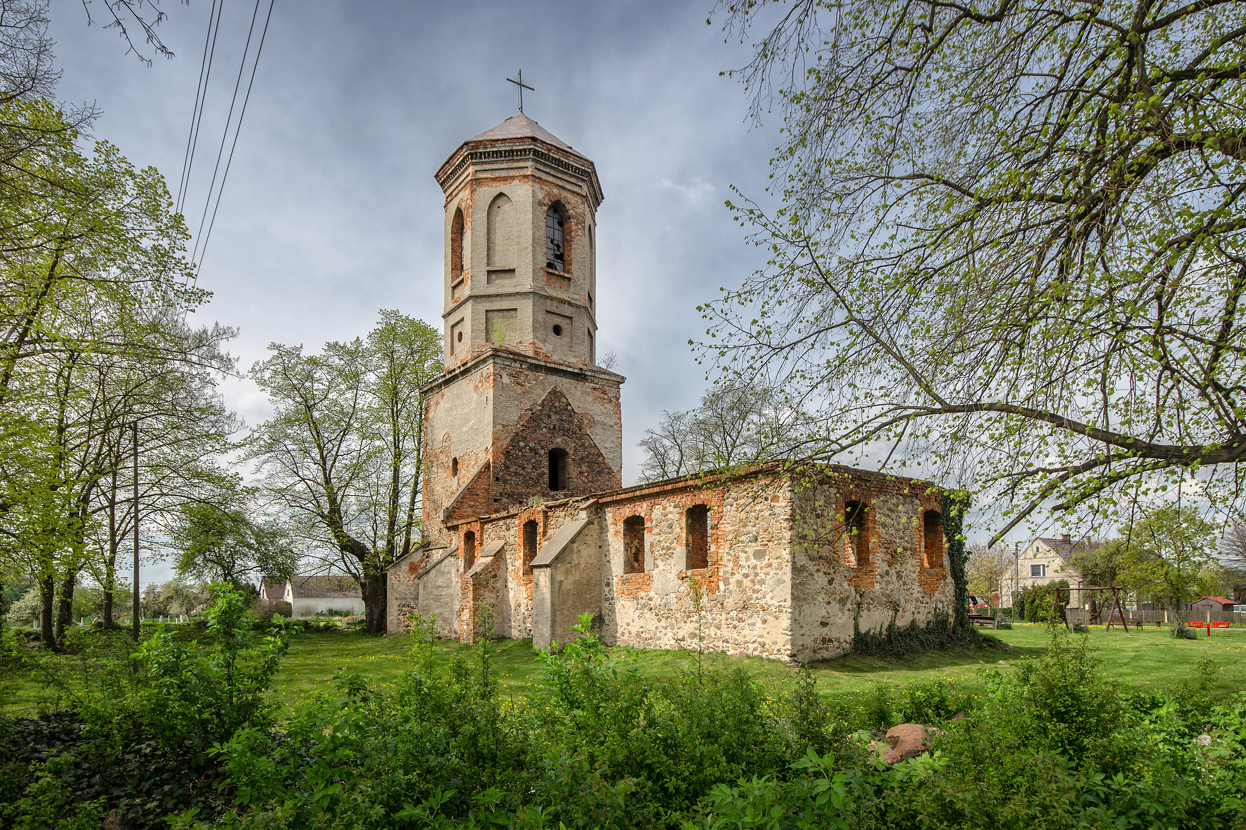 Górzyn, kościół p.w. św. Michała Archanioła (trwała ruina), XV, XIX